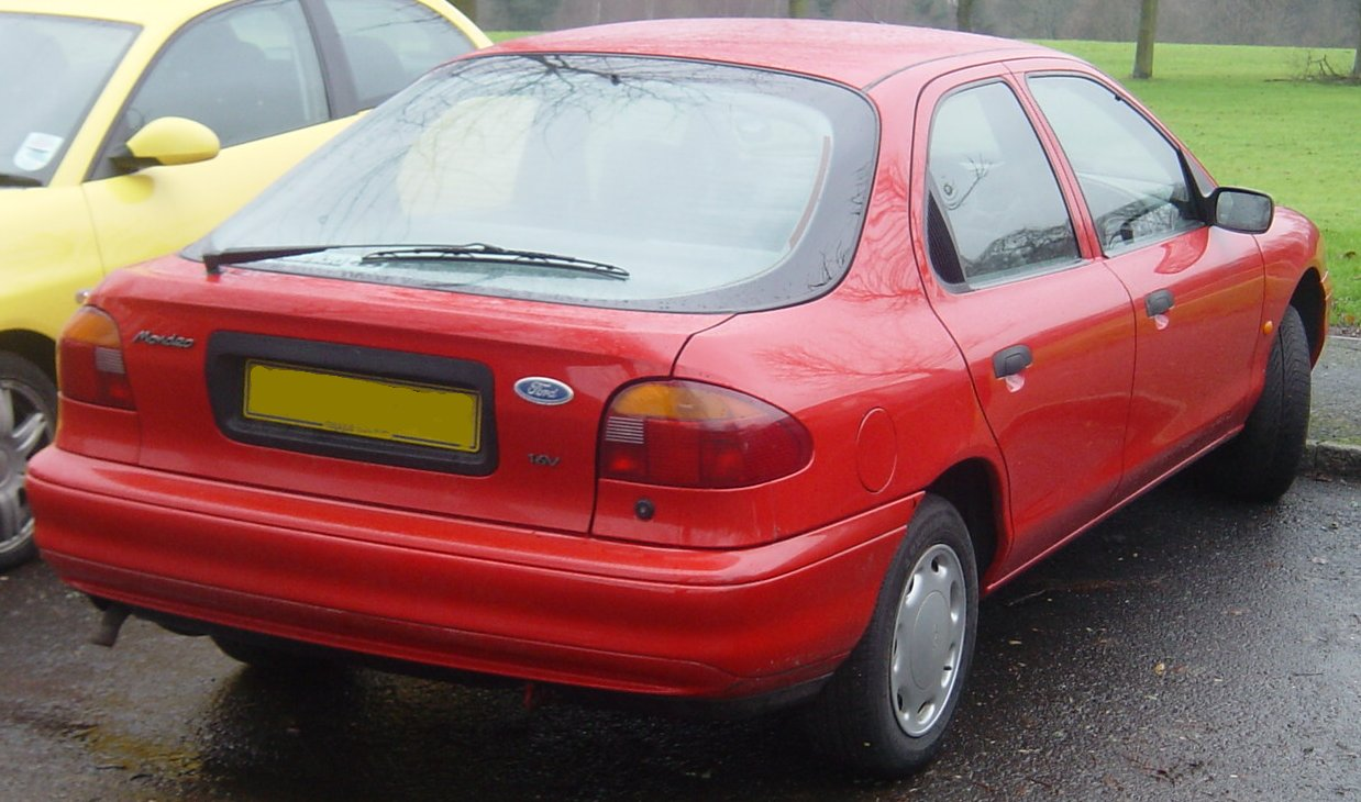 Ford Mondeo Mk I Liftback(MY1993 - 1996)